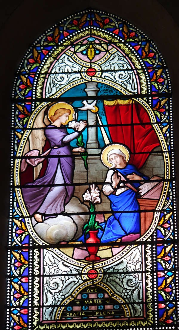 Vitrail